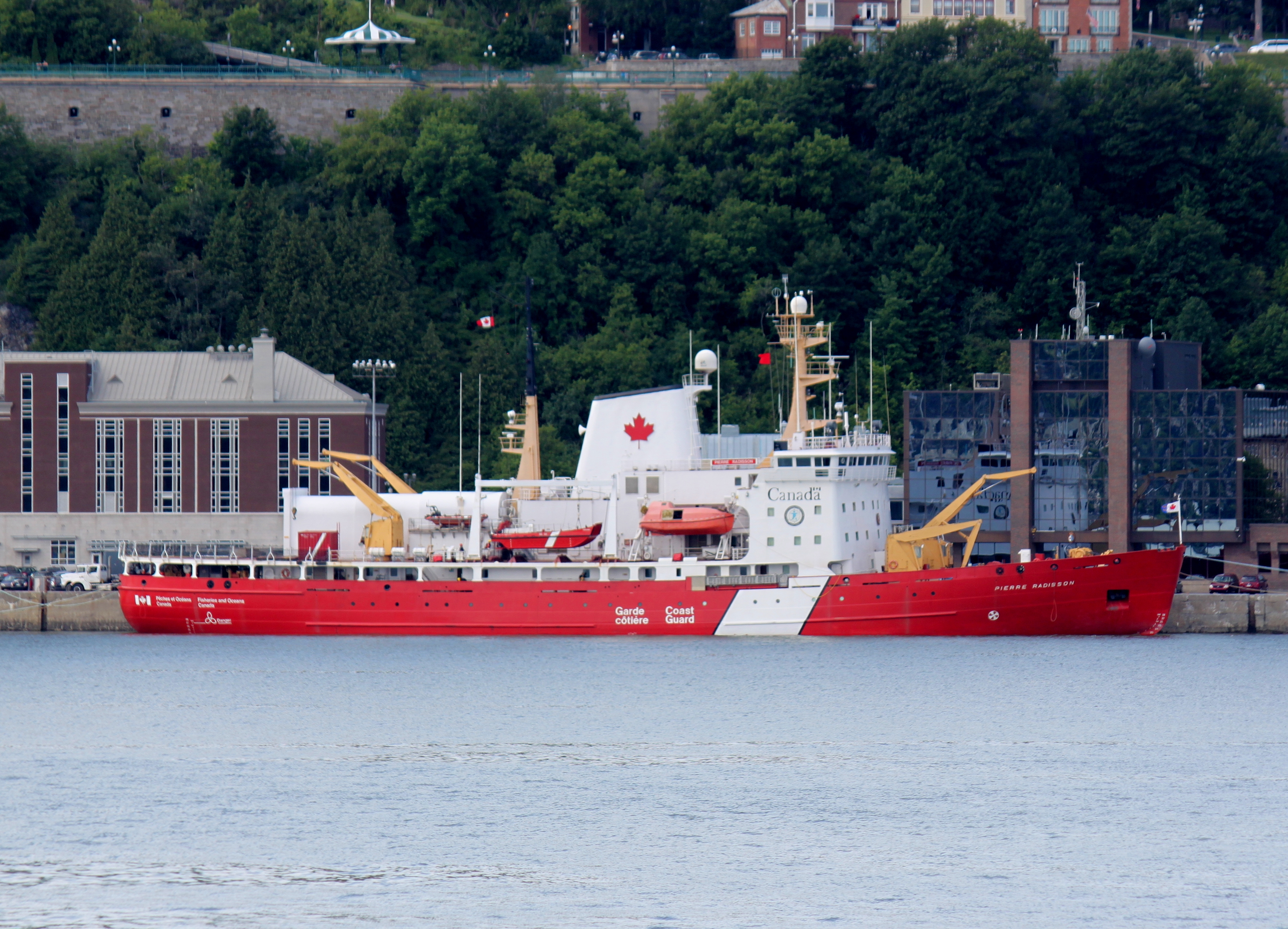 The Canadian Coast Guard in Quebec City.